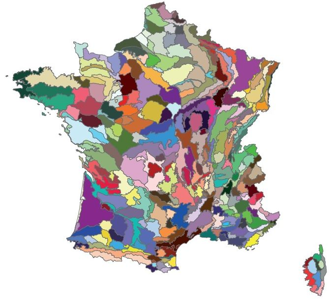 Ancien découpage de l'IFN